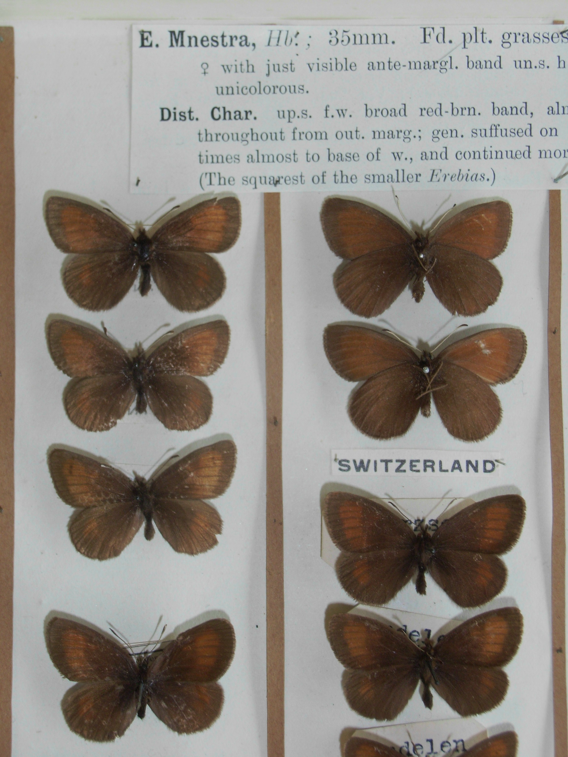 Erebia mnestra